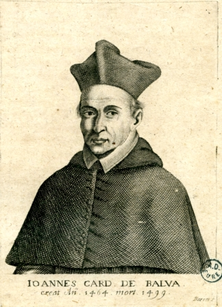 "IOANNES CARD. DE BALVA", dit Jean Balue (1421-1491). Évêque d'Évreux (1464-1467) puis d'Angers (1467-1476), premier ministre de Louis XI, cardinal. Estampe: burin et eau-forte, 13,3 x 9,3 cm.